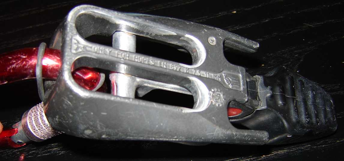 TRE Sirius Sicherungsgerät